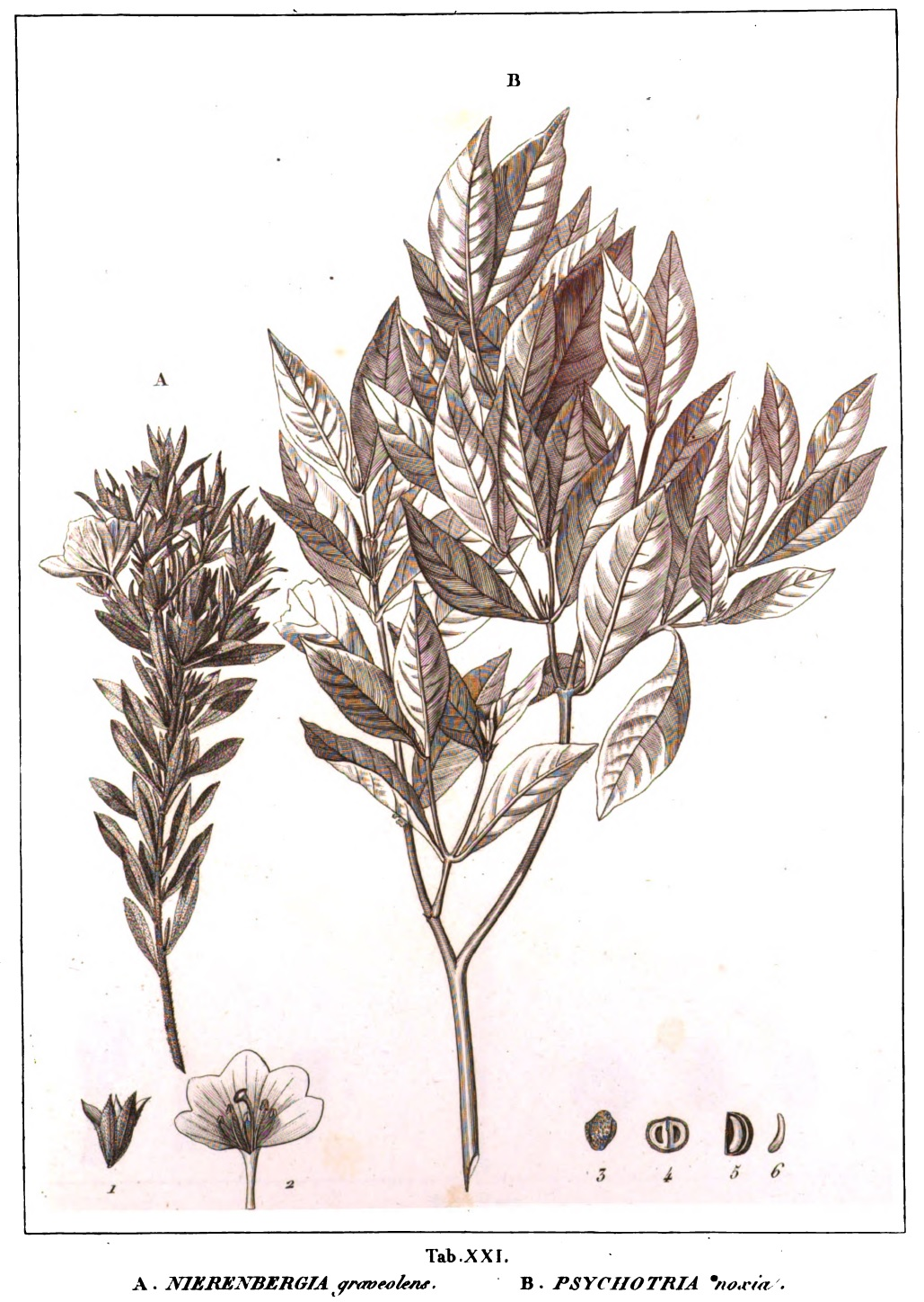 Figura XXIII - em "Histoire de plantes les plus remarquables du Brésil et du Paraguay"